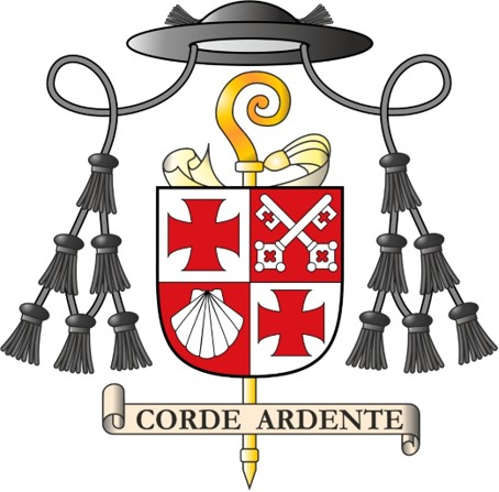 Der geteilte und gespaltene Schild zeigt zwei Mal das Stiftswappen, das rote Georgskreuz auf silbernem Grund, und zwei persönliche Attribute. Im oberen Feld die gekreuzten silbernen Schlüssel des Apostels Petrus auf rotem Grund: Die Darstellung der Schlüssel entspricht jener im Wappen des ehemaligen Klosters Cluny im französischen Burgund. Propst Petrus war oft in dieser Gegend, die auch Heimat der Communauté von Taizé ist. Im unteren Feld ist eine silberne Jakobsmuschel auf rotem Grund: Dieses Pilgerzeichen verdeutlicht, dass wir alle auf dem Weg zu Gott sind. Propst Petrus ist im Jahr 2016 den Jakobsweg von Herzogenburg nach Santiago gegangen. Die Linien der Muschel laufen auf ein gemeinsames Ziel zu und versinnbildlichen, dass wir auf die Ewige Heimat zugehen. Der Wahlspruch „Corde ardente“ heißt übersetzt „mit brennendem Herzen“. Er ist einerseits eine Reverenz an den Ordensvater Augustinus, dessen Attribut das brennende Herz ist. Andererseits bezieht er sich auf das Evangelium von Emmaus. Die Insignien, die das Wappen umgeben, weisen die Pontifikalrechte des Propstes aus.